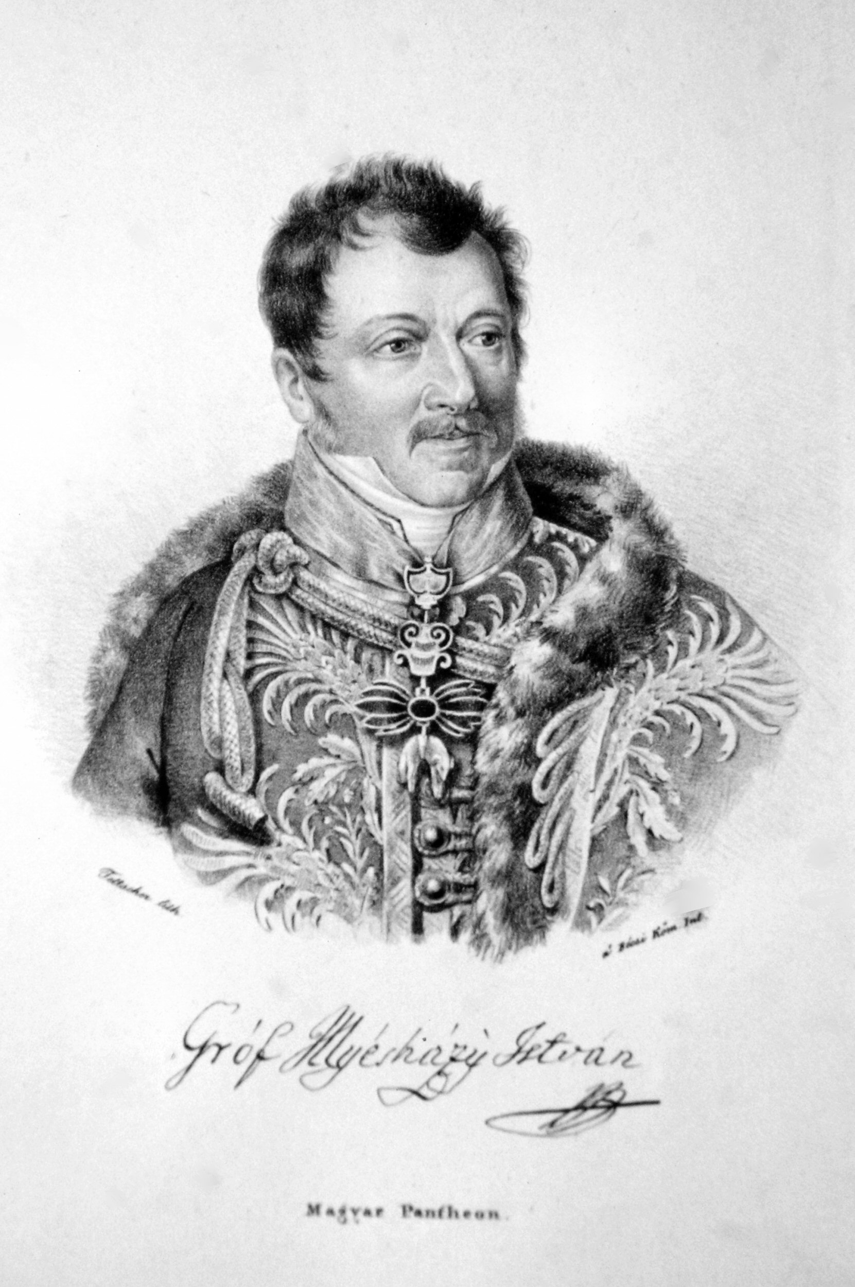 Stephan Illeshazy (1782-1858), Erbobergespan des Liptauer und Trencsiner Komitats,Vliessritter, k. k. Geheimrat, k. k. Kämmerer. Lithographie von Josef Eduard Teltscher, caa. 1830